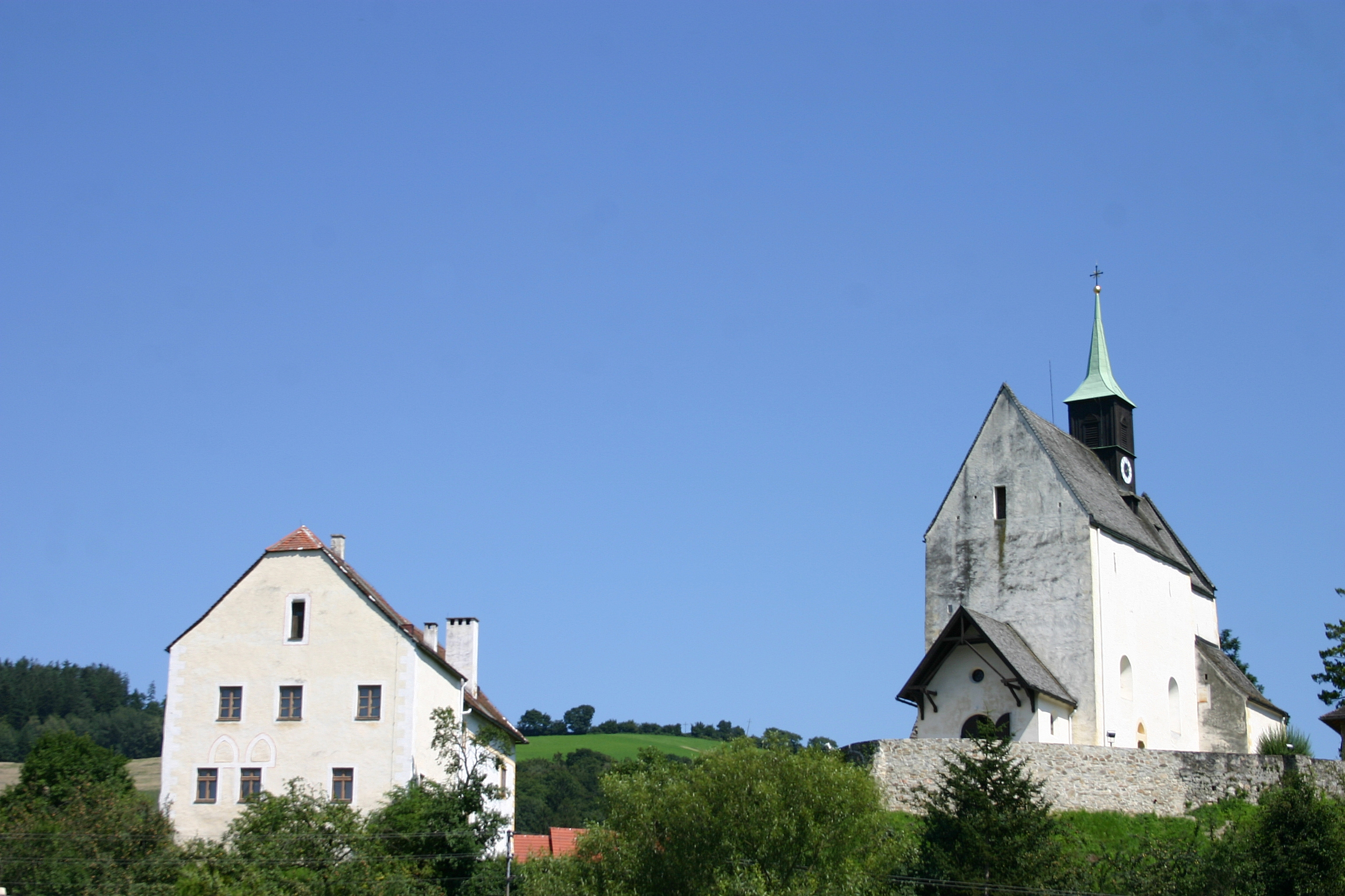 Bad Schönau Pfarrkirche und Pfarrheim